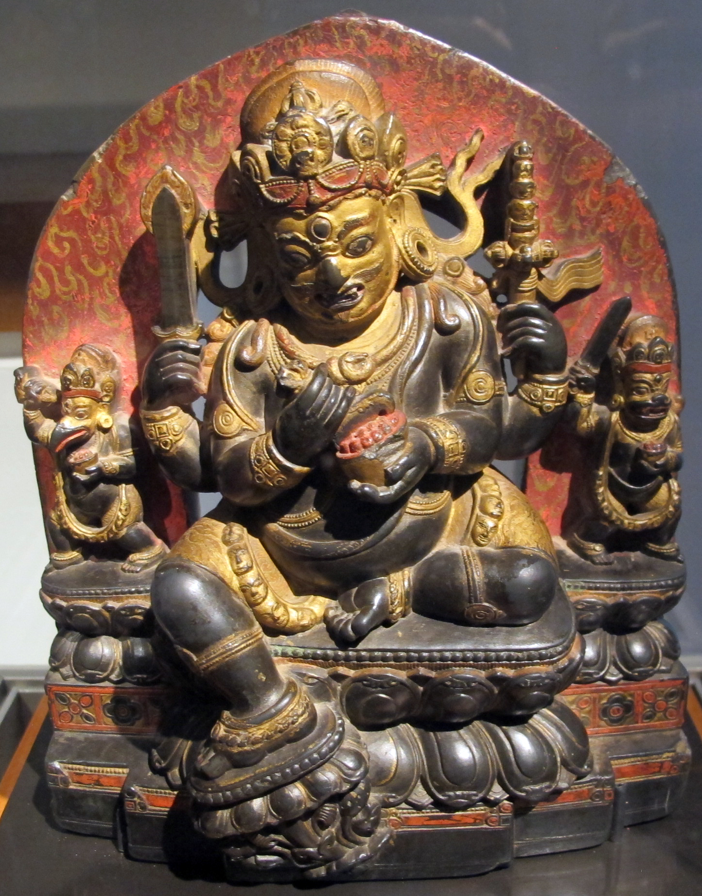 Tibet, mahakala sotto l'aspetto di ye-shes mgon-po, xii sec